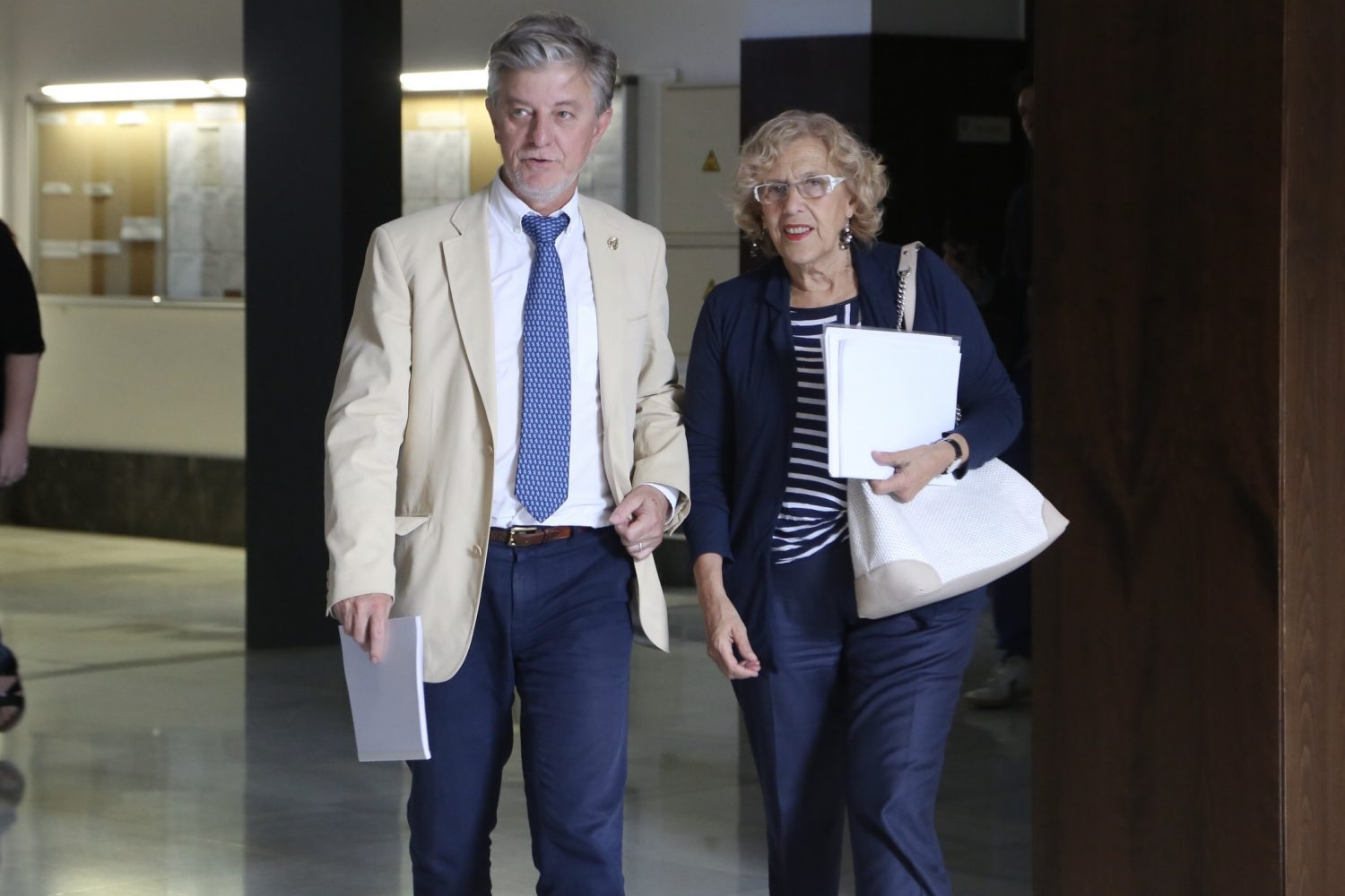 Madrid cree en otra forma de gobernar. Un gobierno en la que la gestión por la gestión no cabe. “La gestión política tiene su sentido en hacer más fácil y cómoda la vida de los ciudadanos. Para nosotros Madrid es la ciudad de los cuidados. Tenemos la obligación de cuidar a los ciudadanos”. Con estas palabras, la alcaldesa de Madrid, Manuela Carmena, ha clausurado la cátedra de Presupuestos Participativos de la facultad de Derecho de Zaragoza con la ponencia “Otra manera de gobernar”.